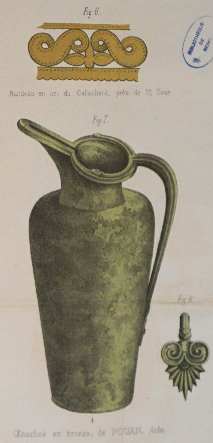 lithographies de fouilles.